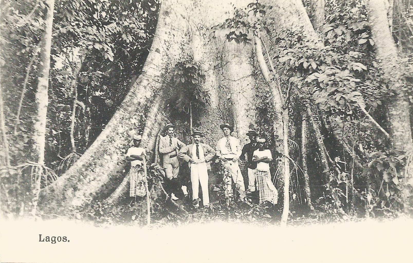 Lagos. Carte postale ancienne, sans indication d'auteur, d'éditeur ou de date. Collection particulière